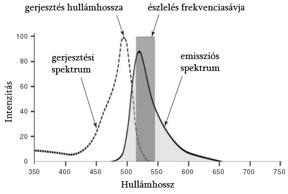 Fluoreszcencia-dia